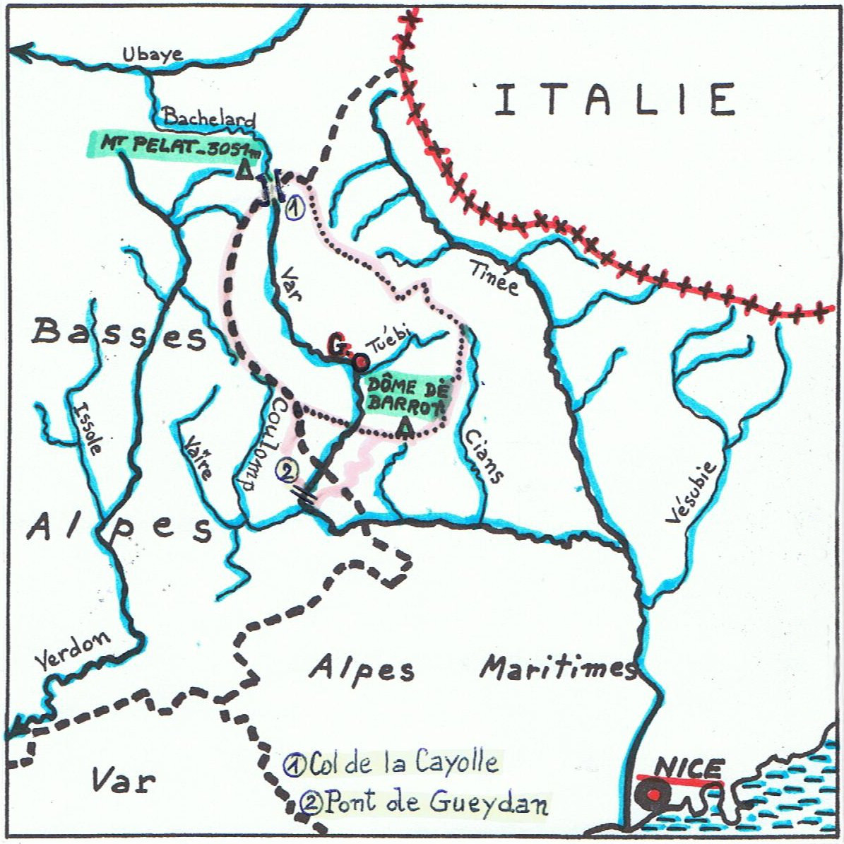 Le bassin hydrographique du Haut-Var avec ses deux sous-secteurs dont le plus important est limité en pointillés.